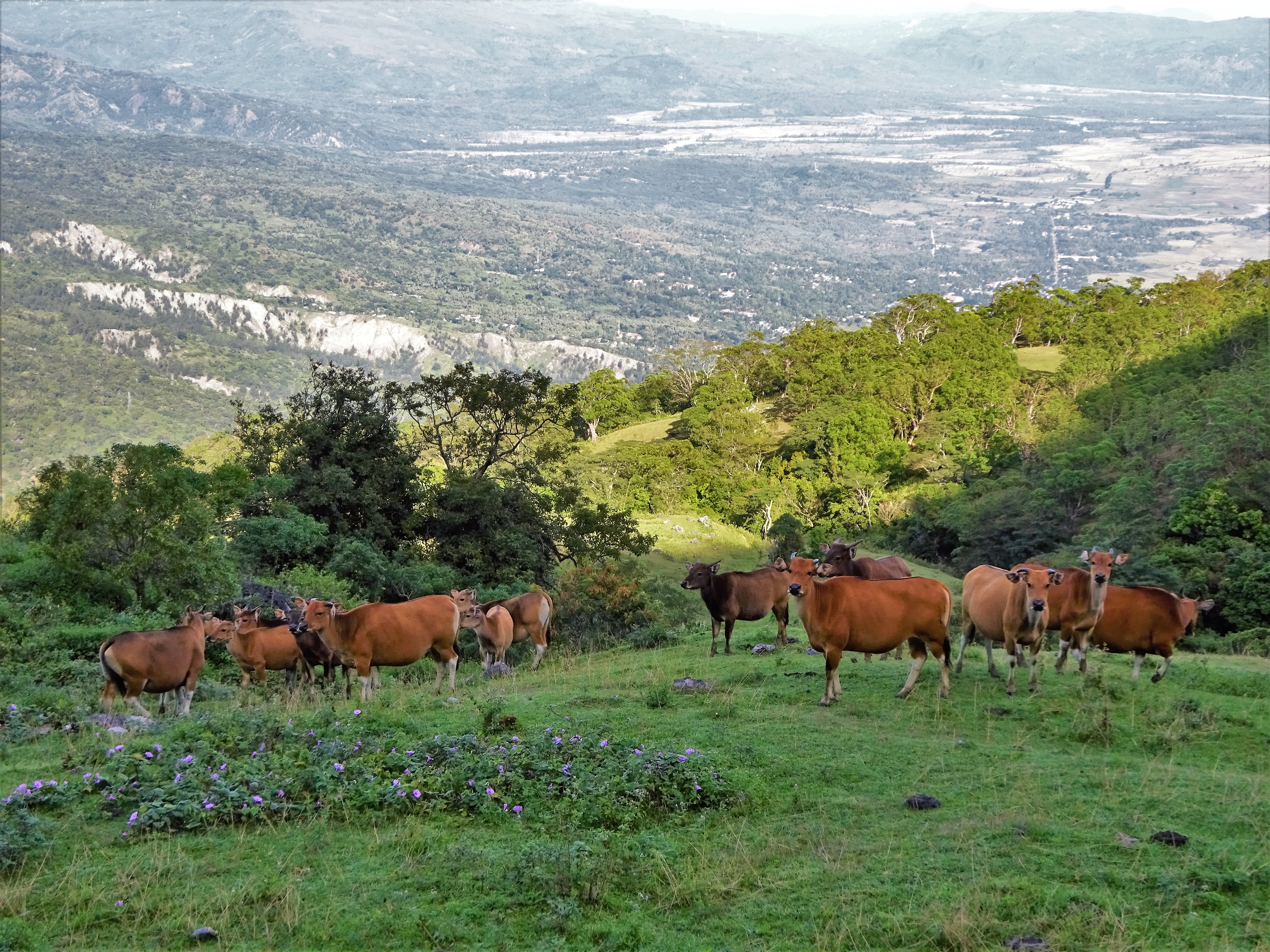 Rinder auf dem Leolaco